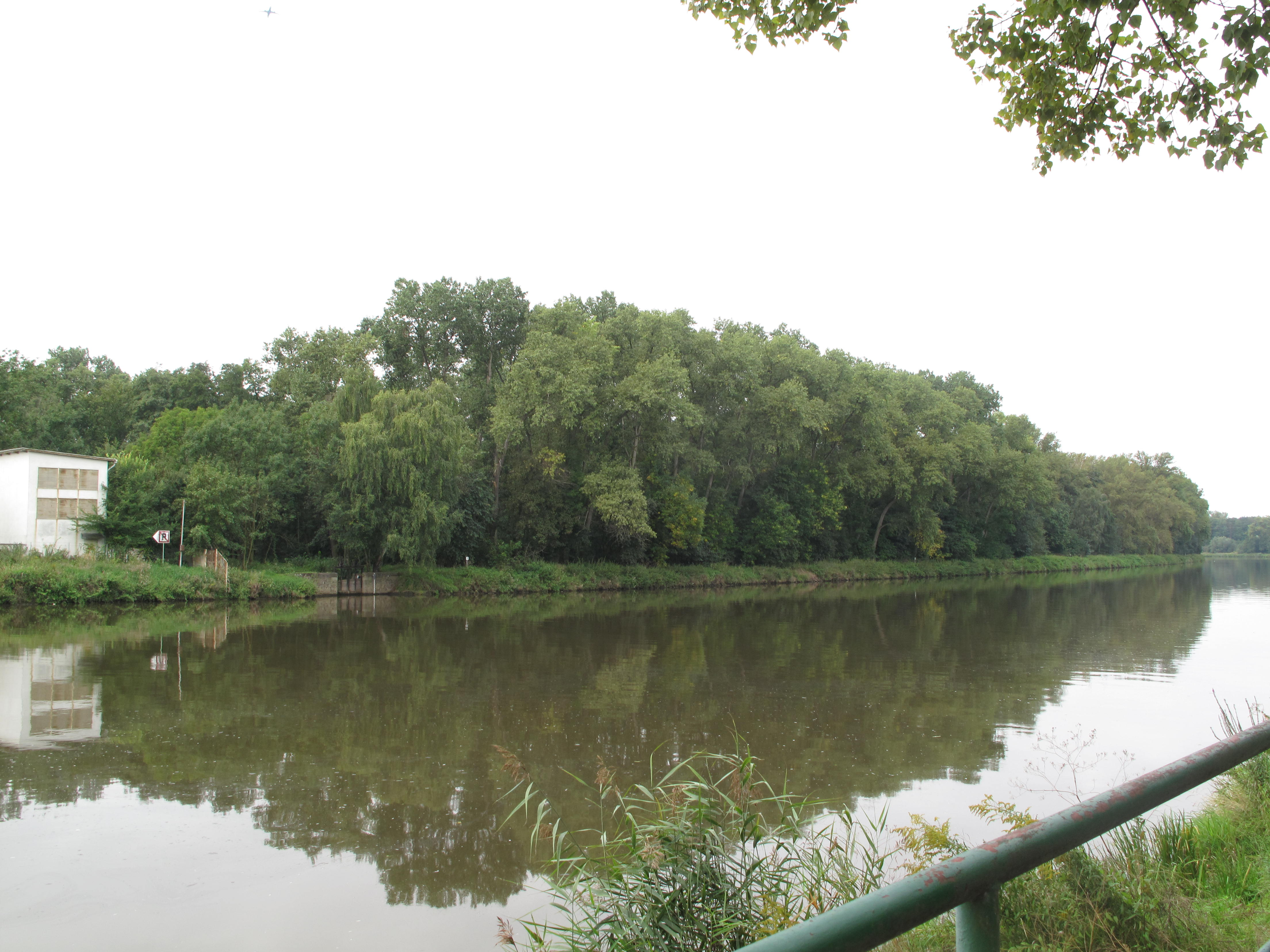 Černínovsko focené z druhé strany Labe